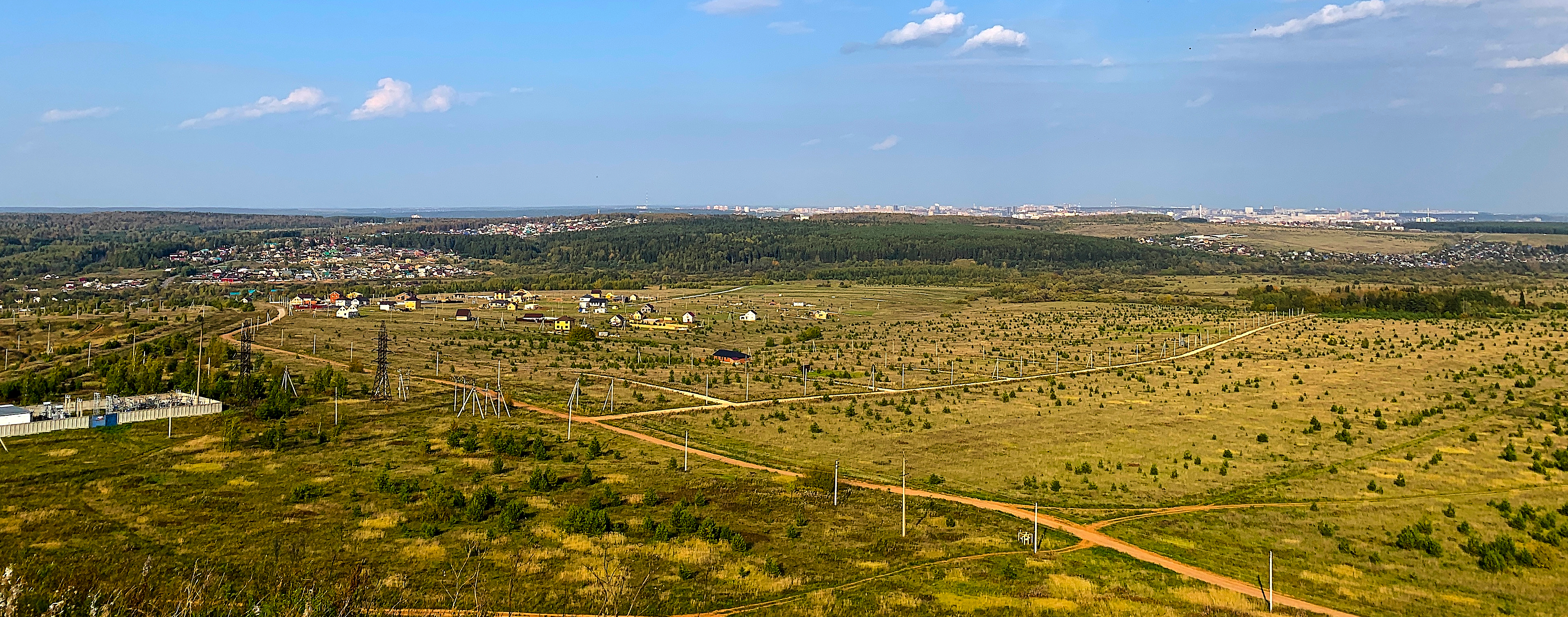 Вид на Ижевск с горы Чекерил